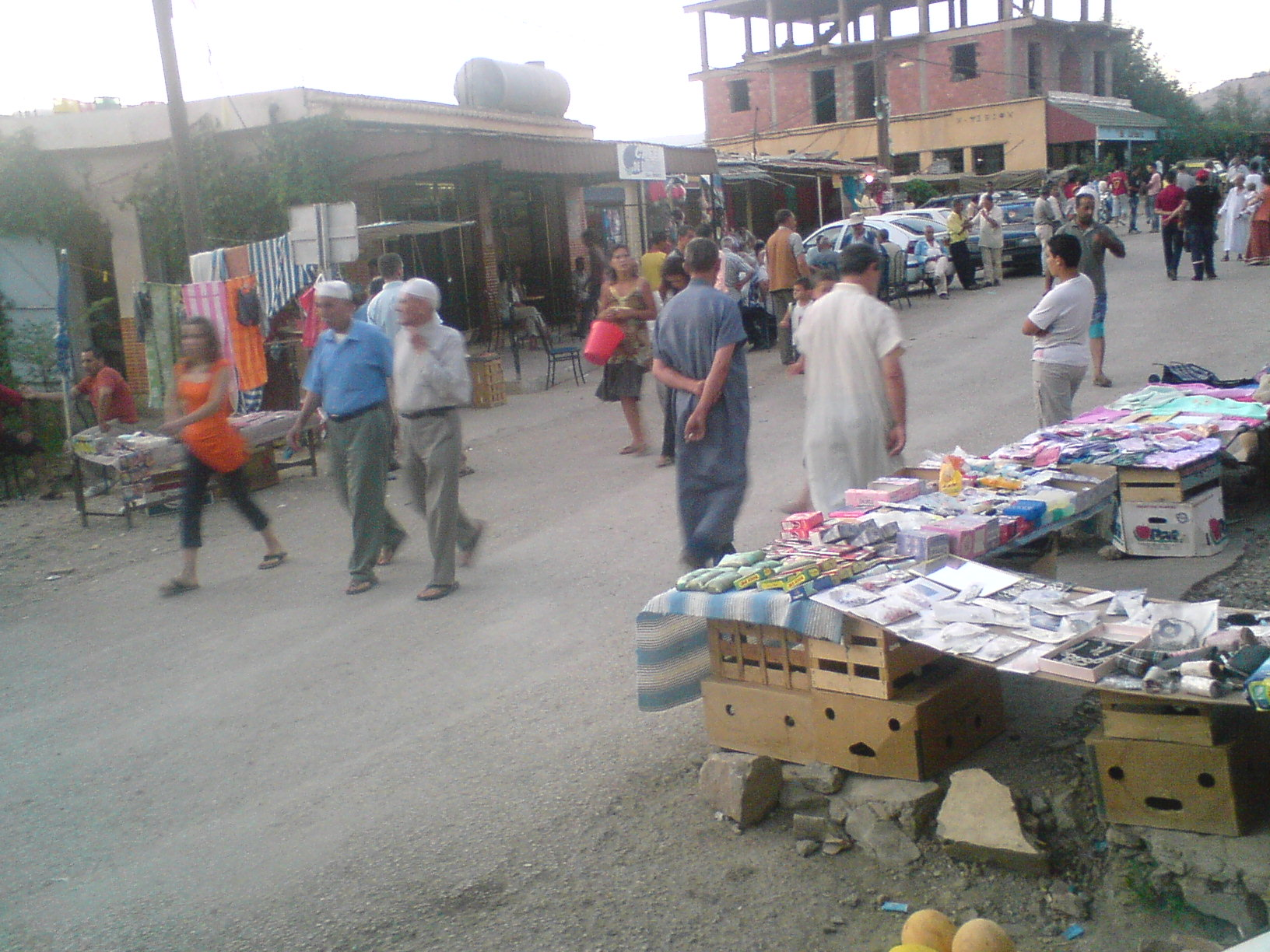 Village d'Assif El Hammam en Kabylie (Adekar, Algérie).